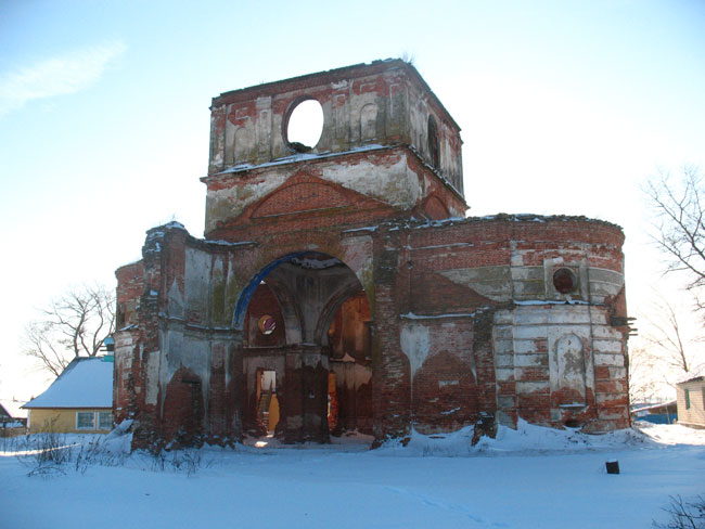 Леніна. Царква Мікалая Цудатворца